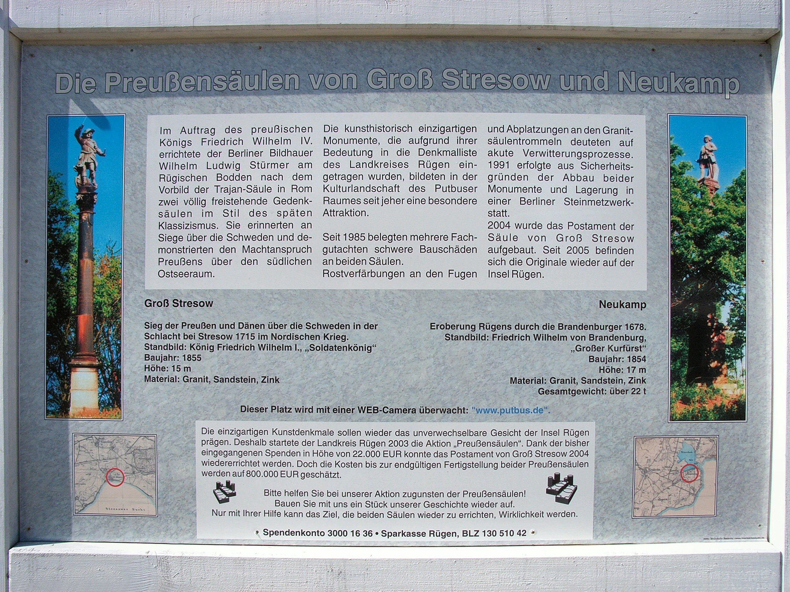 Informationstafel am Lagerplatz der Originalteile der Preußensäulen in der Alleestraße von Putbus auf der Insel Rügen (Die Fotos auf der Informationstafel sind vertauscht und zeigen das jeweils andere Denkmal.)